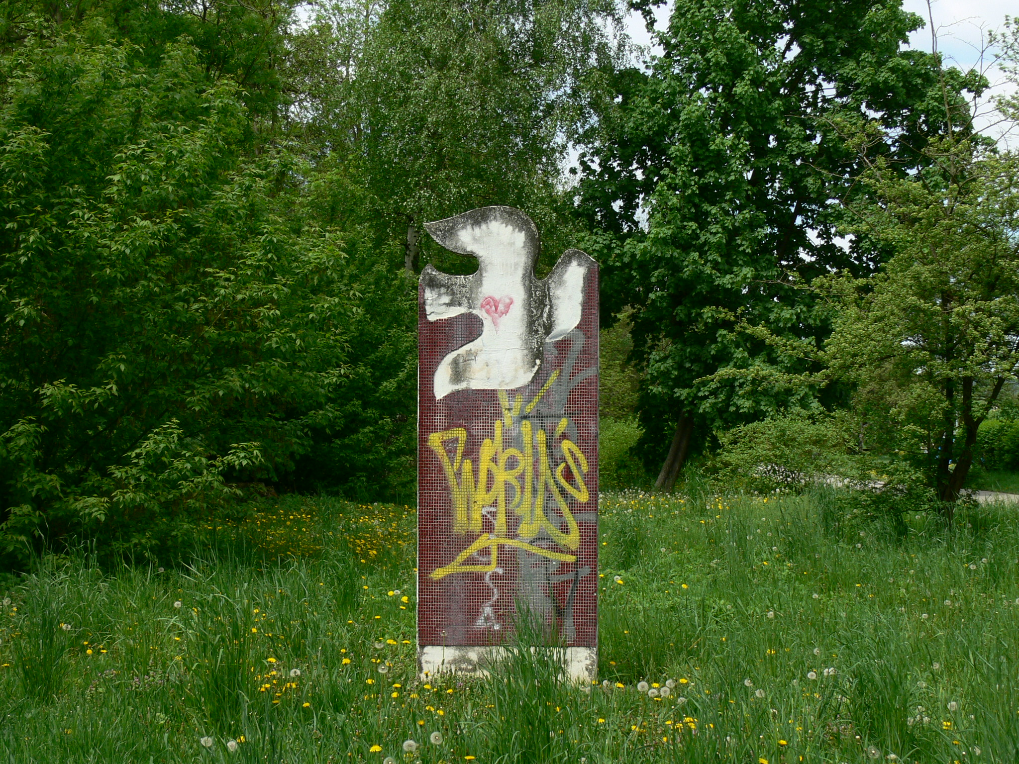 Dědice, Holubice míru